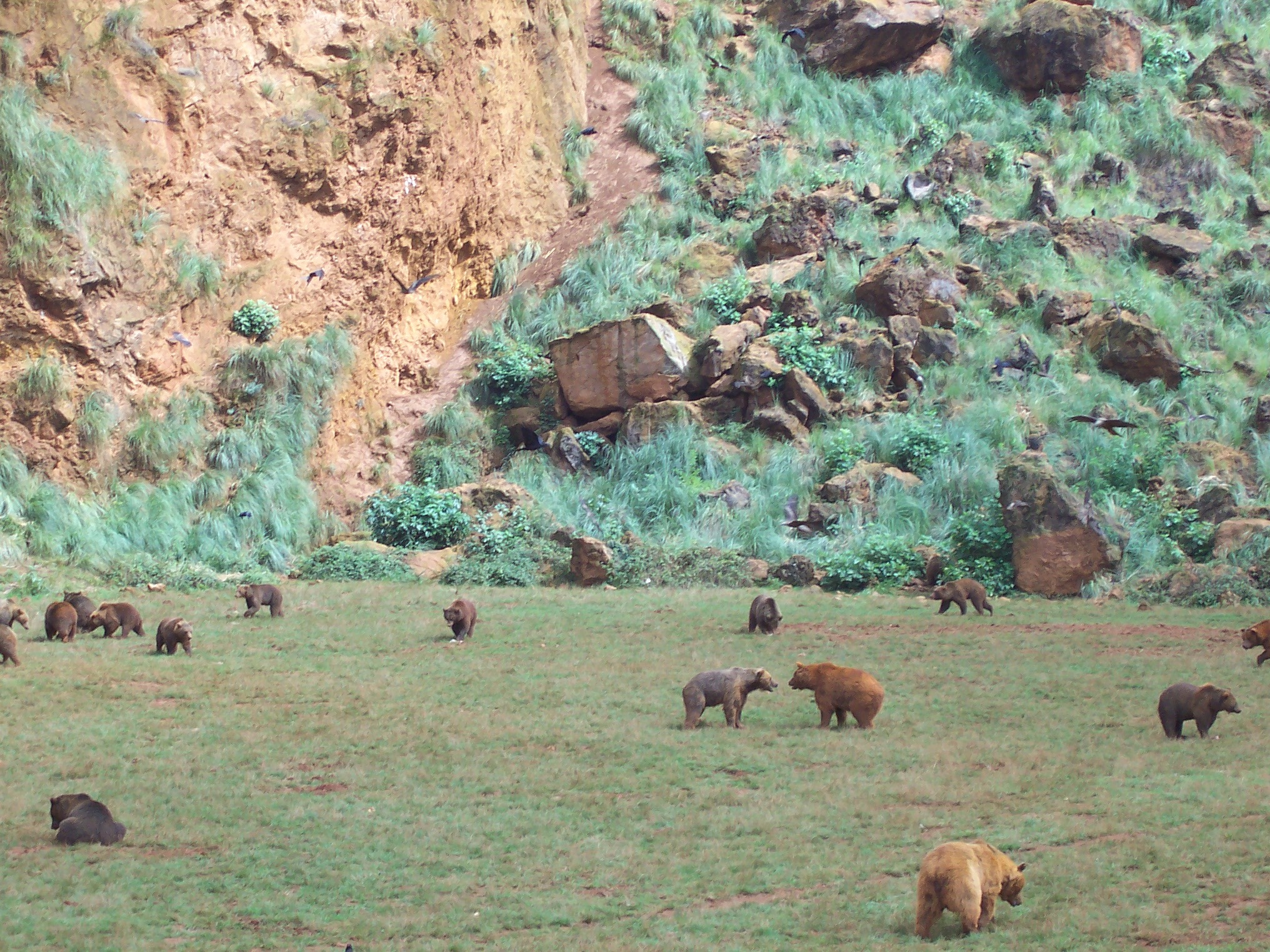 Cabárceno